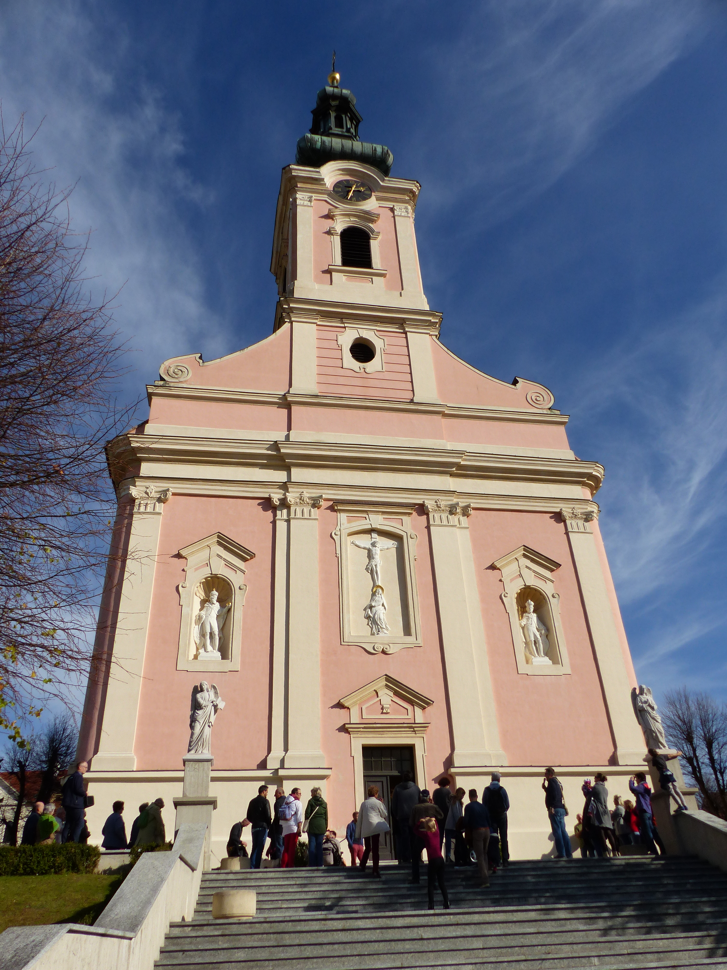 Westansicht der römisch katholischen Pfarrkirche in Pinkafeld